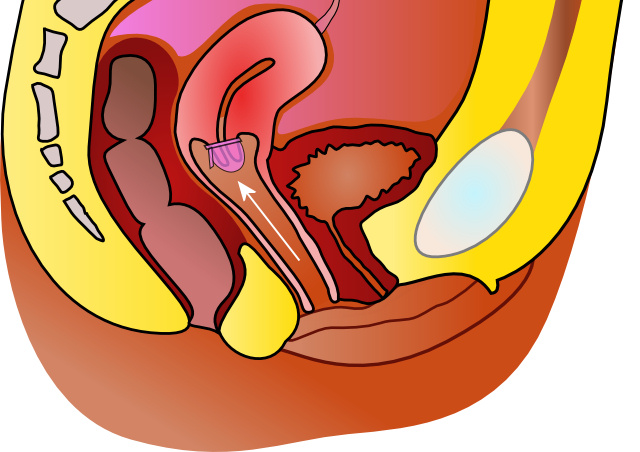 Eine eingesetzte, zur Verhütung dienende Portiokappe.